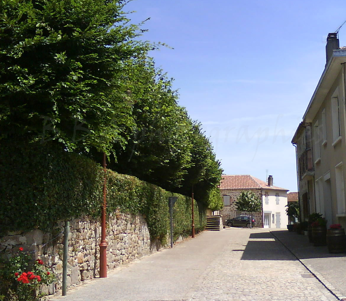 mur d'enceinte Sud, Chateau de Brillac